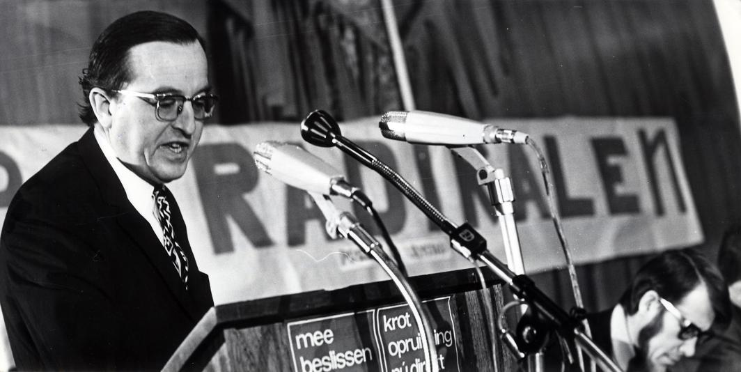 Aarden, J.M. ( KVP / PPR / Groep Aarden). J.M. Aarden aan het woord tijdens een PPR-congres in Den Bosch, waar onder meer gesproken werd over mogelijke samenwerking met de PvdA en D66. Nederland, Den Bosch, 30 januari 1971.